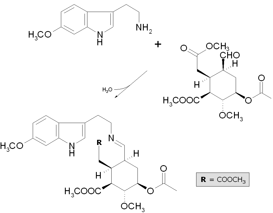 Erste Hälfte des zehnten Schritts der Reserpin-Totalsynthese nach Woodward.